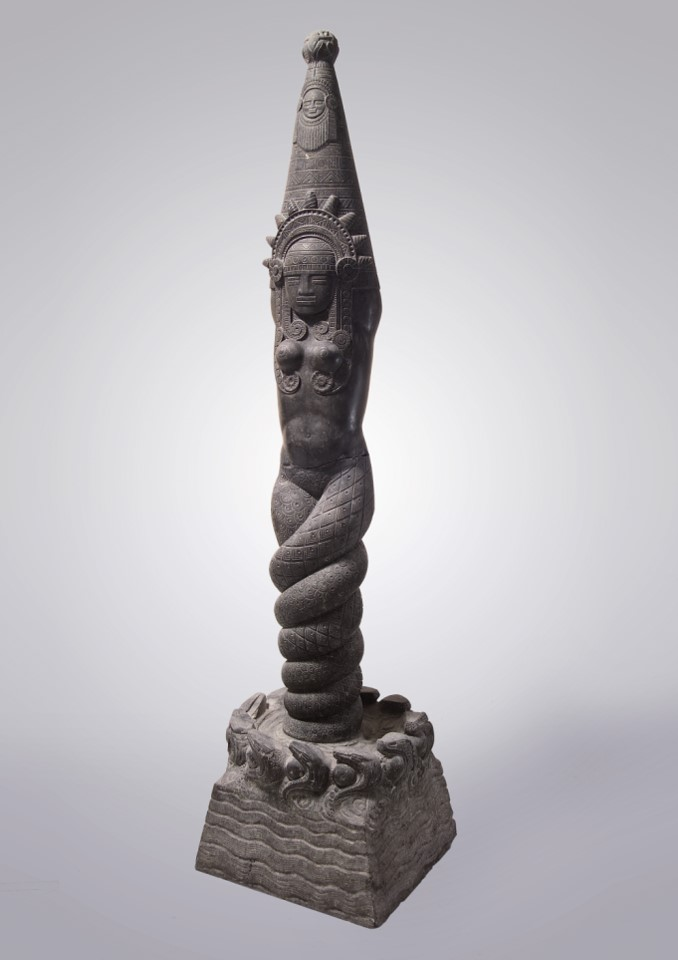 Bachué, diosa generatriz de los chibchas, 1925, talla en granito. Imagen Galería Mundo.